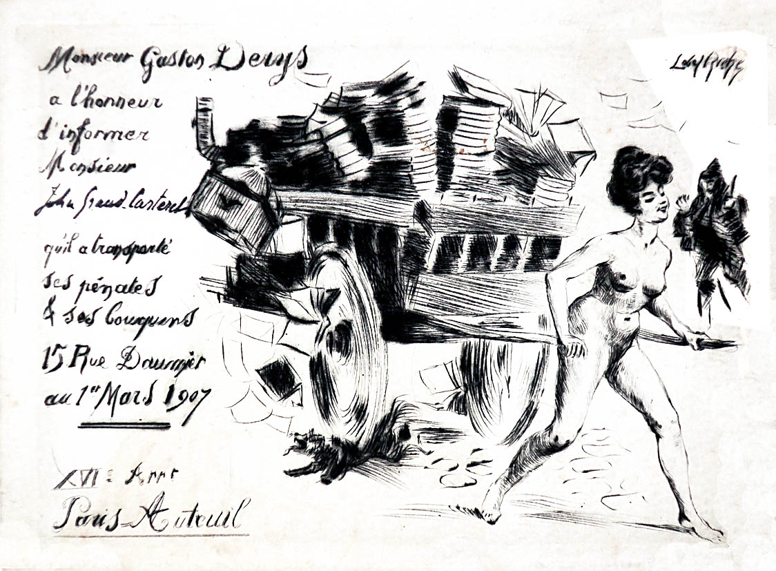 carte de Gaston Derys annonçant son déménagement Rue Daumier en mars 1907